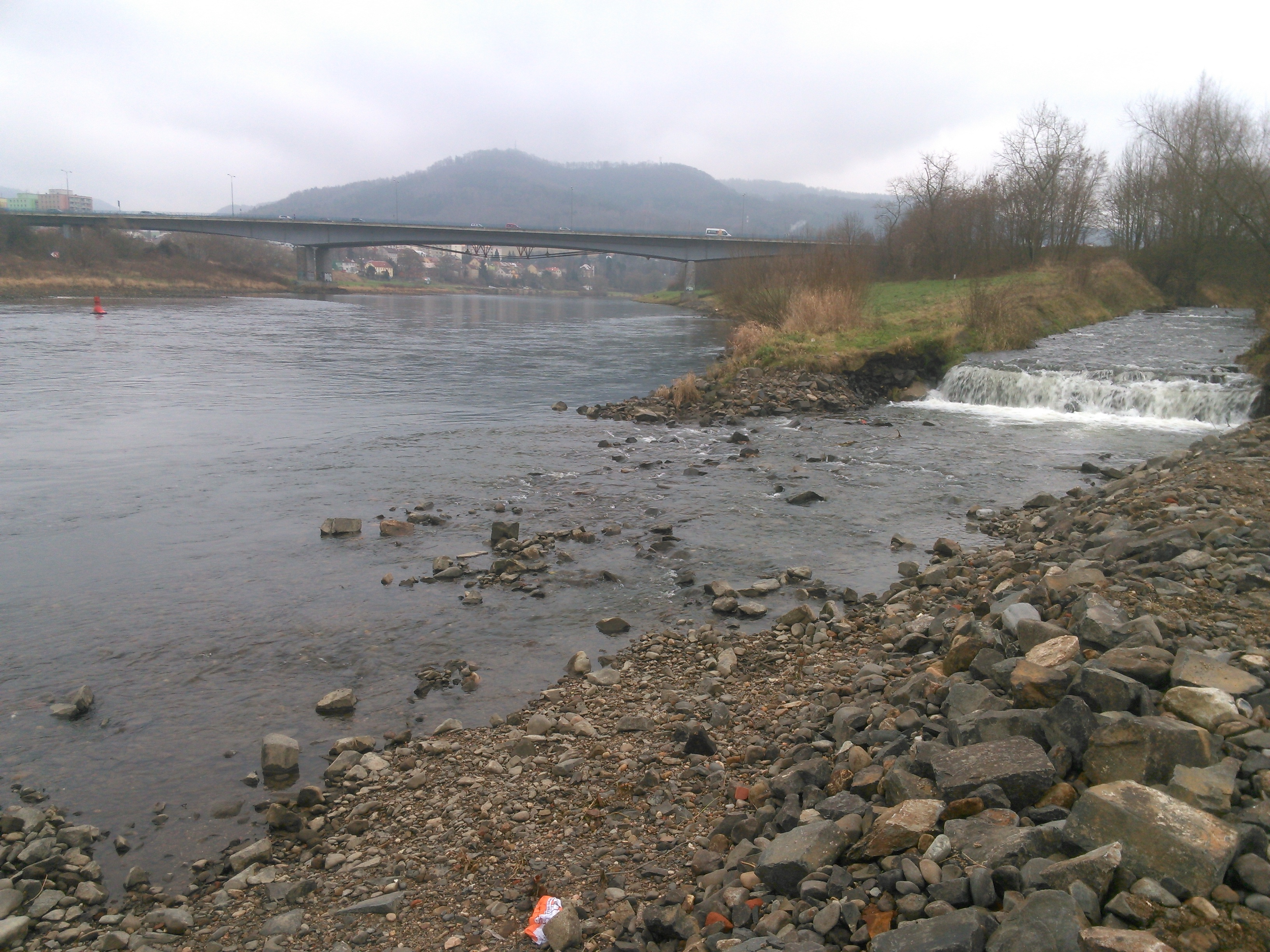 Potok